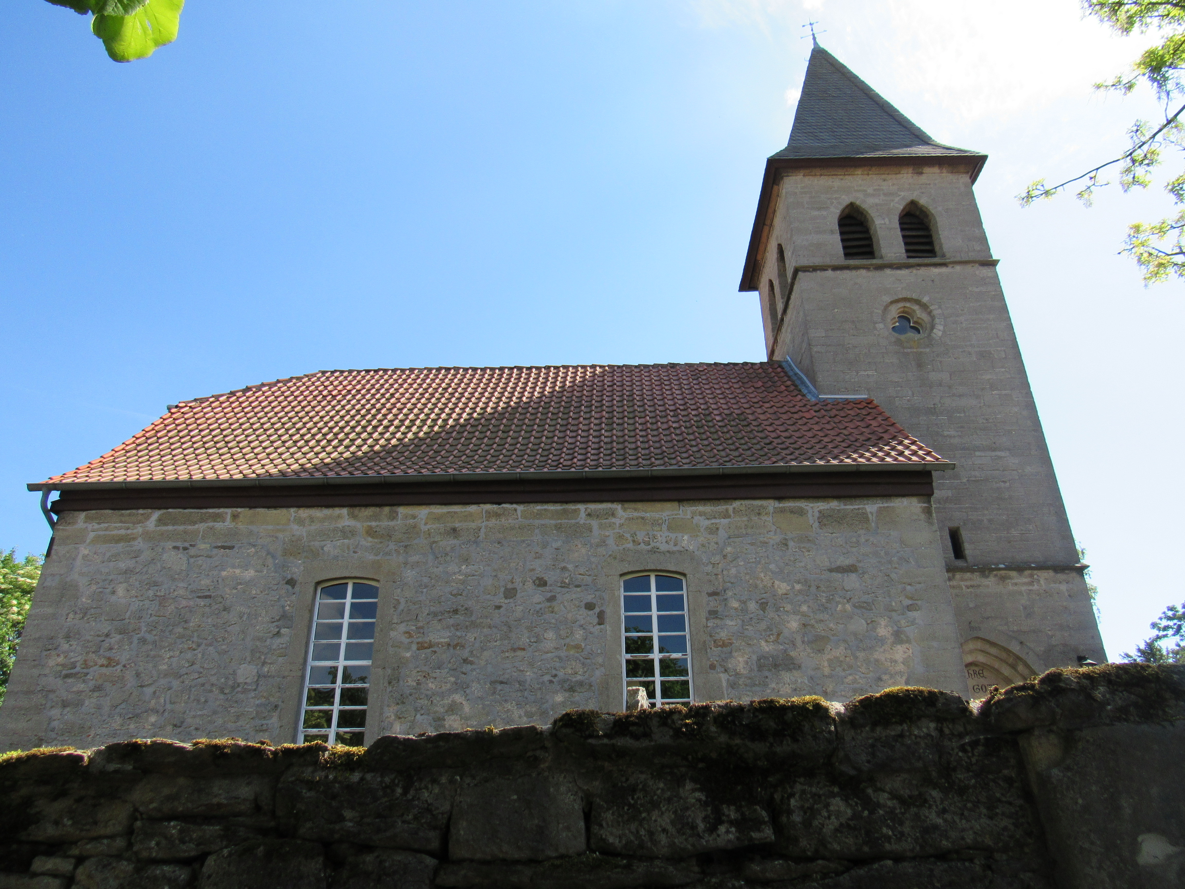 Archfeld, Kirche